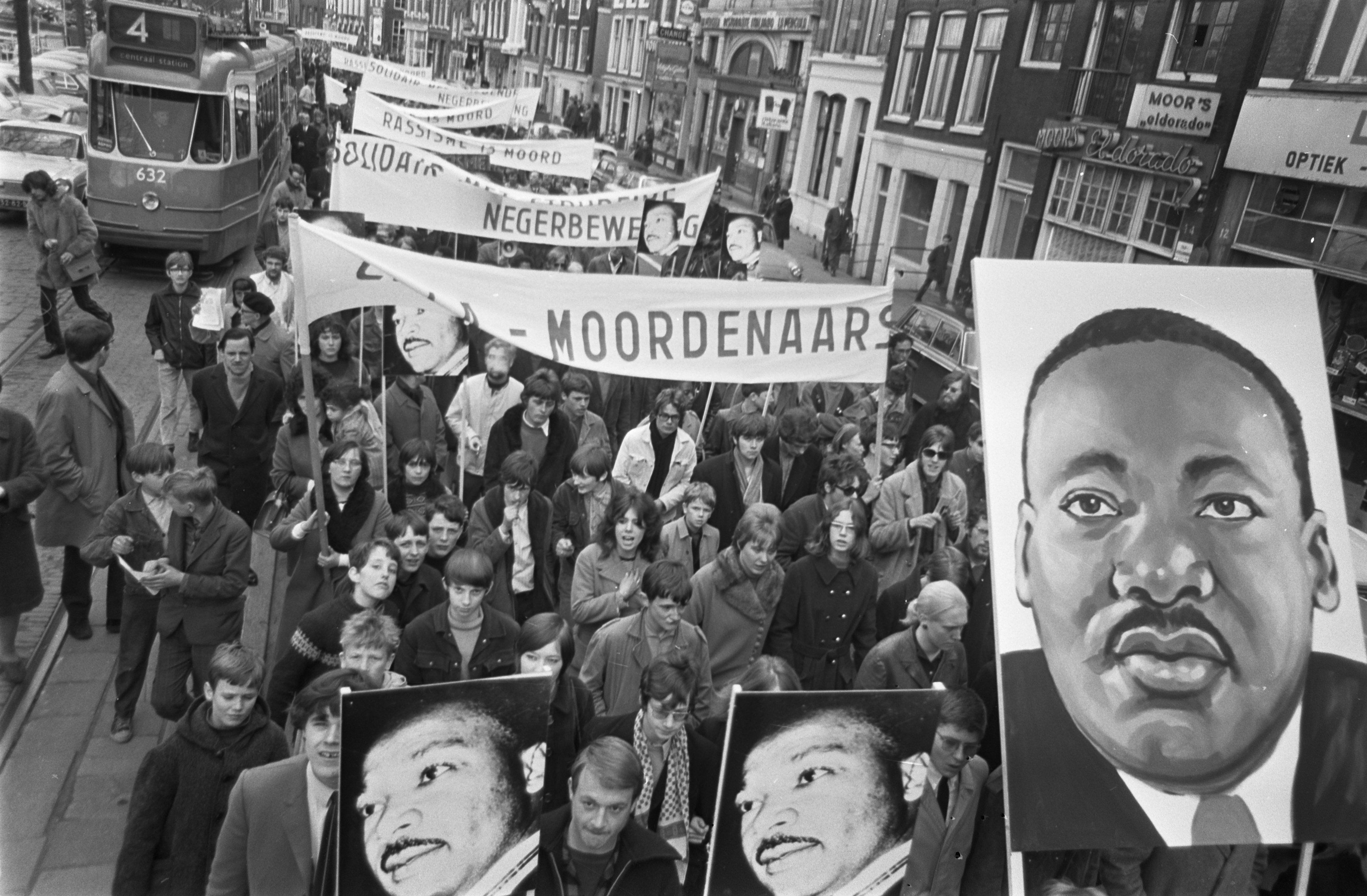 Collectie / Archief : Fotocollectie Anefo Reportage / Serie : [ onbekend ] Beschrijving : Herdenkingstocht door Amsterdam voor Martin Luther King de stoet trekt door de stad met grote fotos van Martin Luther King Datum : 6 april 1968 Locatie : Amsterdam, Noord-Holland Trefwoorden : Herdenkingstochten, stoeten Persoonsnaam : KING MARTIN LUTHER Fotograaf : Nijs, Jac. de / Anefo Auteursrechthebbende : Nationaal Archief Materiaalsoort : Negatief (zwart/wit) Nummer archiefinventaris : bekijk toegang 2.24.01.05 Bestanddeelnummer : 921-2323